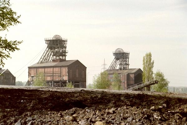 Schacht 1 und Schacht 2 der Zeche Radbod Hamm Bockum-Hövel, Deutschland.